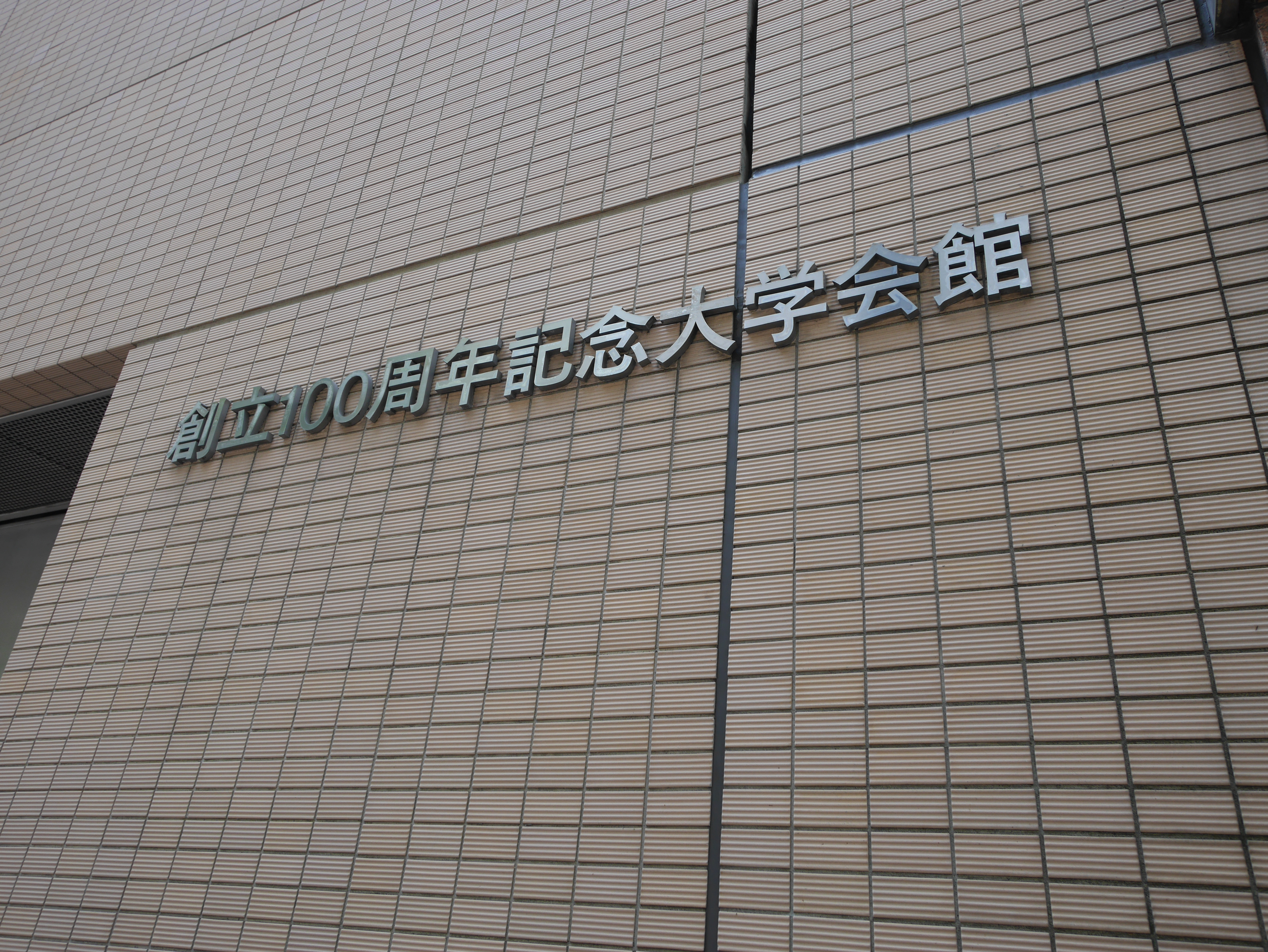 明治大学記念会館